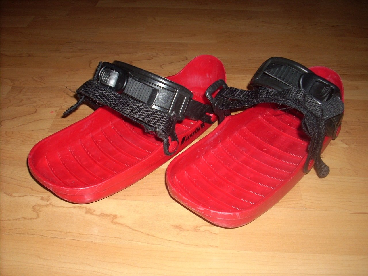 Kluski - zimní zábava